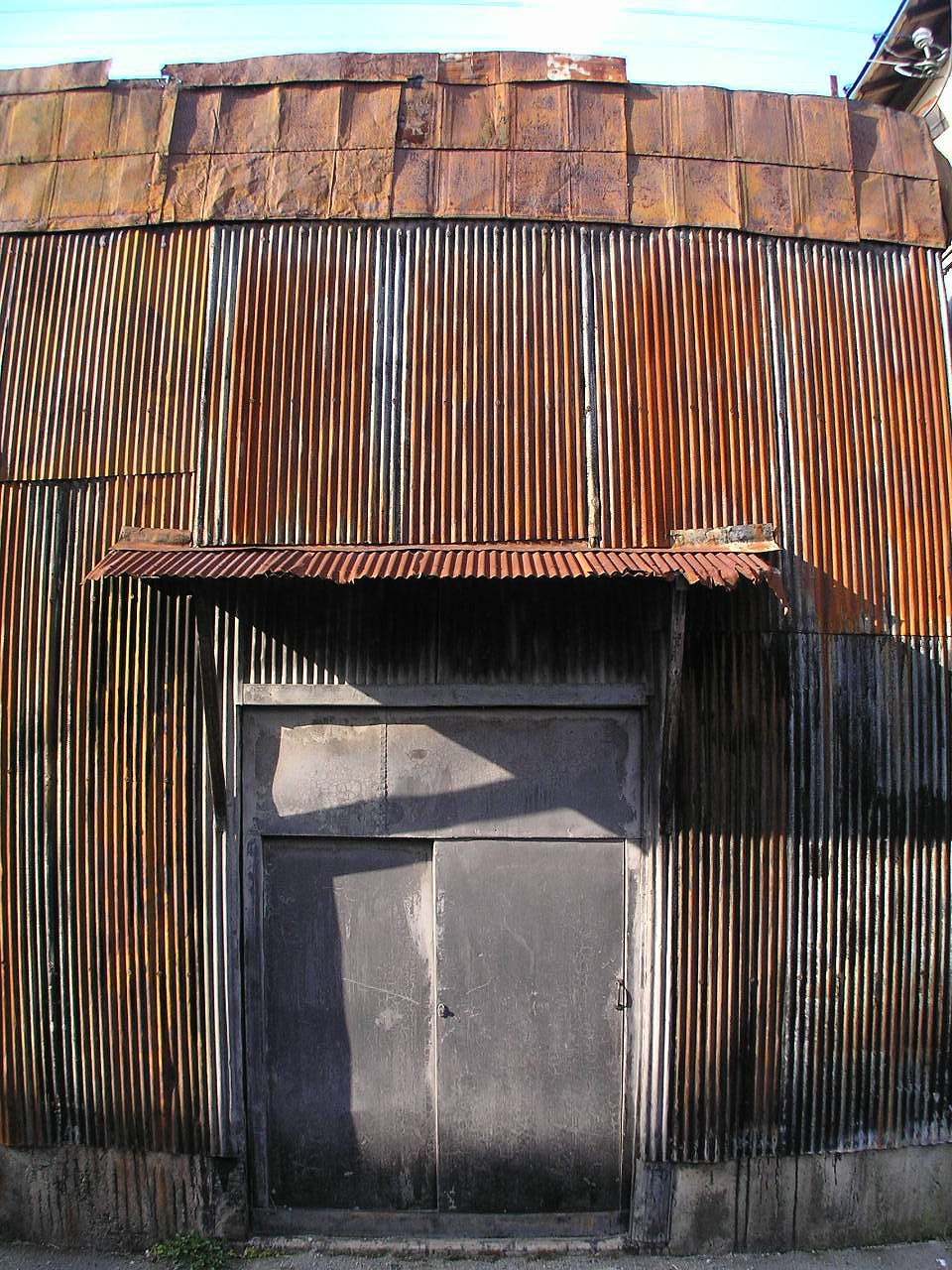 トタンの倉庫